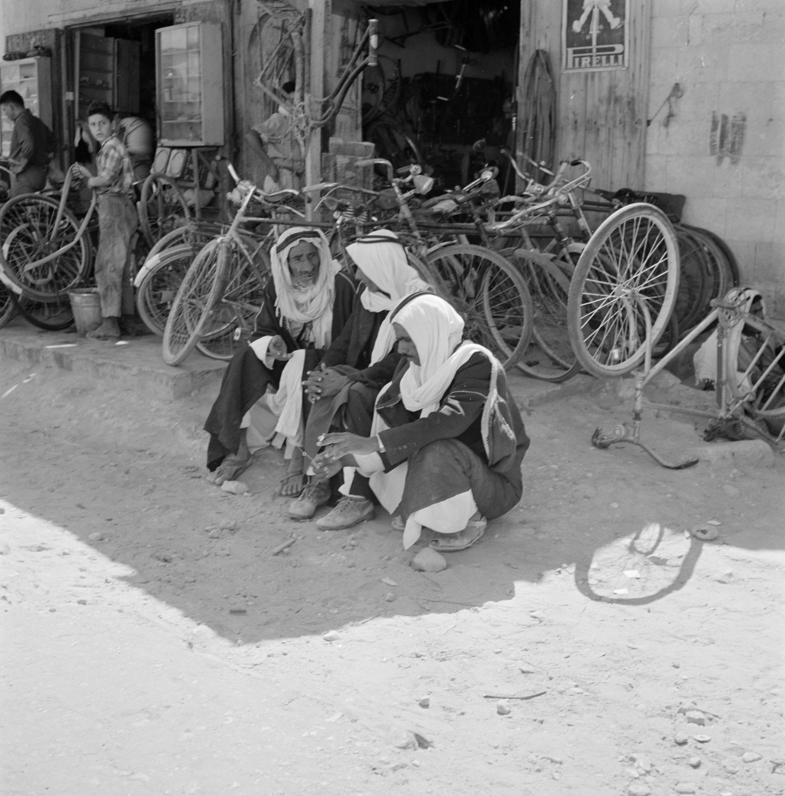 Collectie / Archief : Fotocollectie Van de Poll Reportage / Serie : Israël 1960-1965: bedoeïenen in Beersjewa (Beer Sheva) Beschrijving : Bedoeïenen, zittend aan de straatrand bij een fietsenmaker Datum : 1 januari 1960 Locatie : Beersjewa, Israël Trefwoorden : bedoeïenen, fietsenmakers, gewaden, mannen, straatbeelden Fotograaf : Poll, Willem van de, [onbekend] Auteursrechthebbende : Nationaal Archief Materiaalsoort : Negatief (zwart/wit) Nummer archiefinventaris : bekijk toegang 2.24.14.02 Bestanddeelnummer : 255-3434